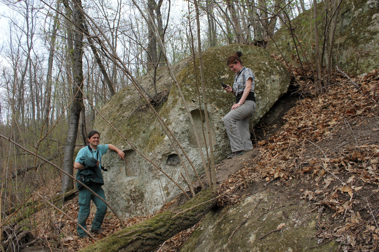 B3, Tibolddaróc, Ablakos-kő-völgy